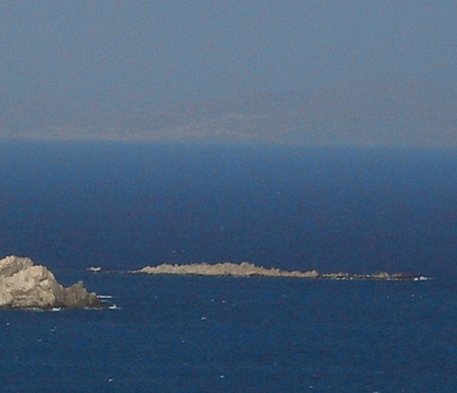 Η βραχοησίδα Κάβουρας Μυκόνου